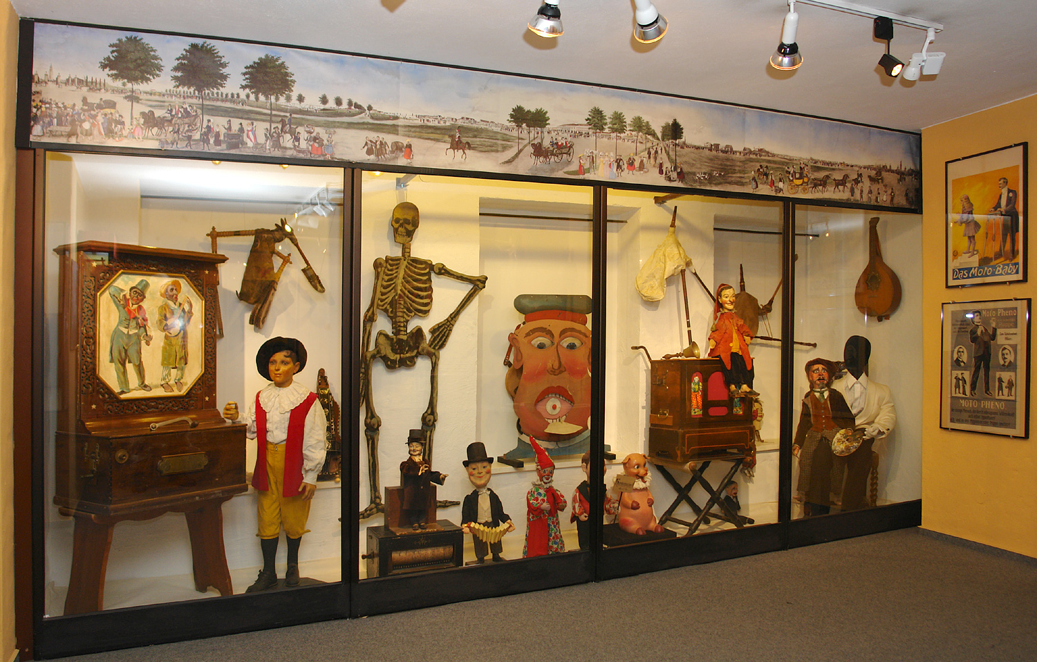 Lübecker Theaterfigurenmuseum